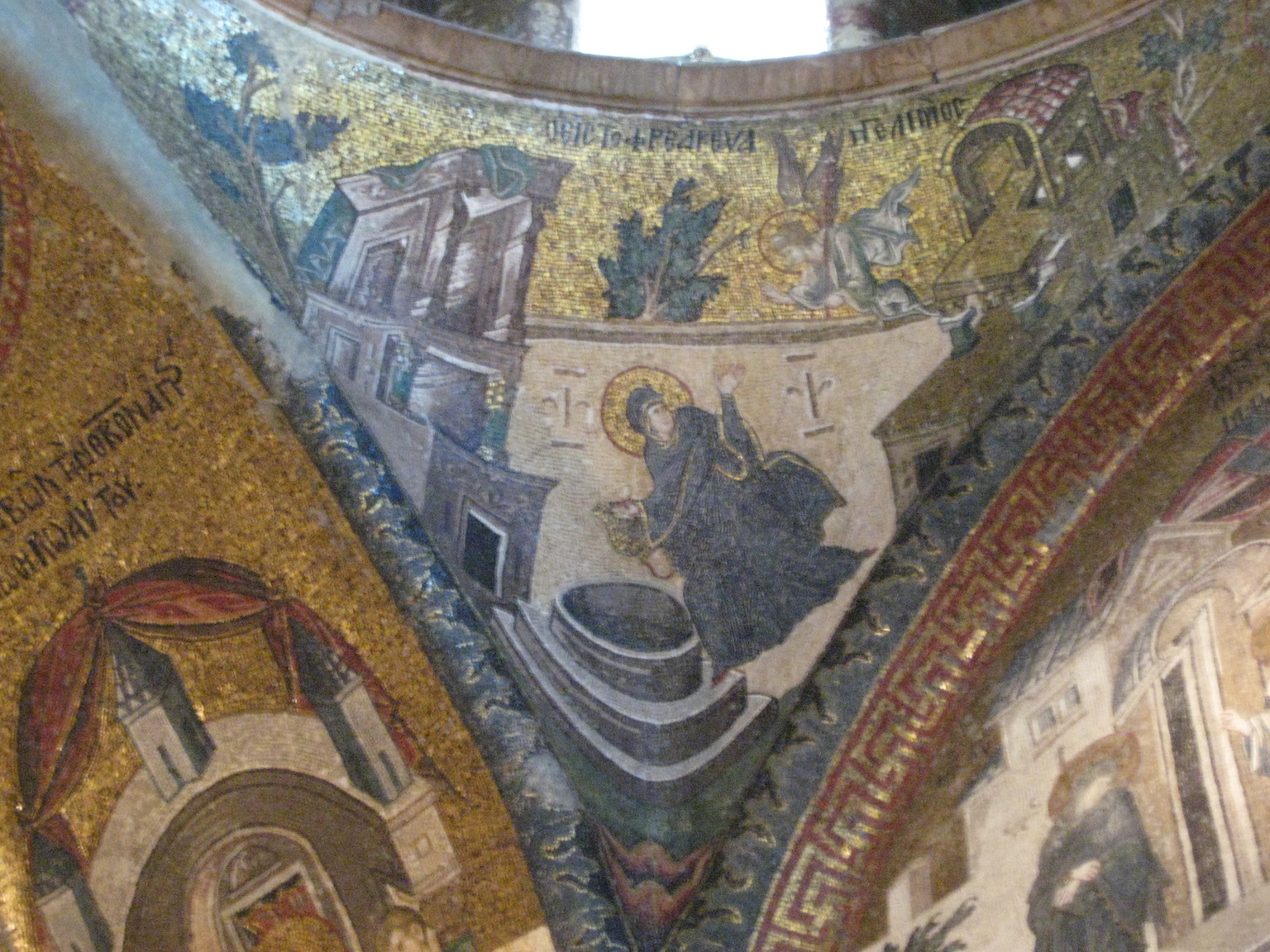 Annunciation at the well. Благовещение у колодца (Протоблаговещение). Mosaic in Chora church